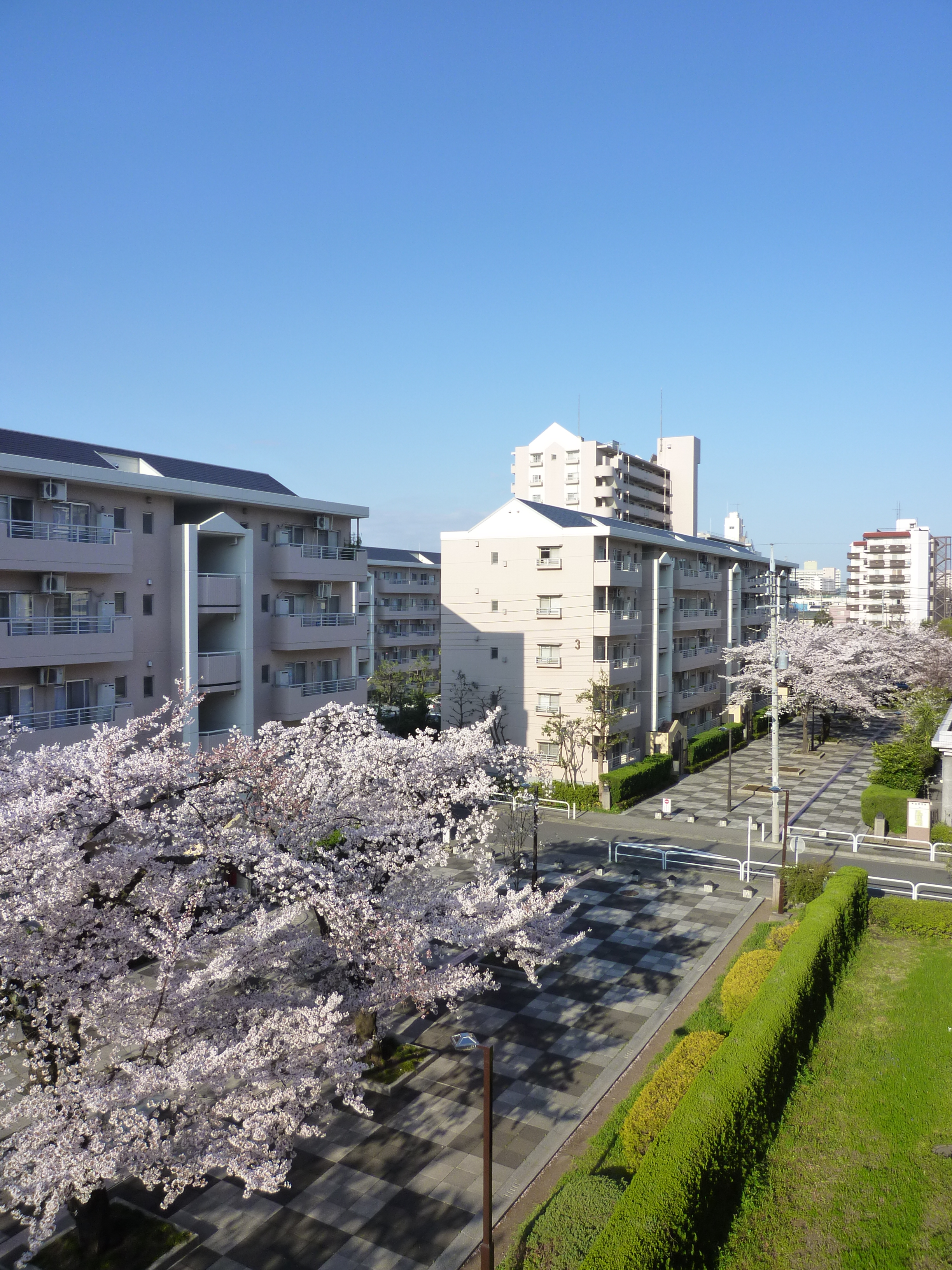 UR新蓮根団地